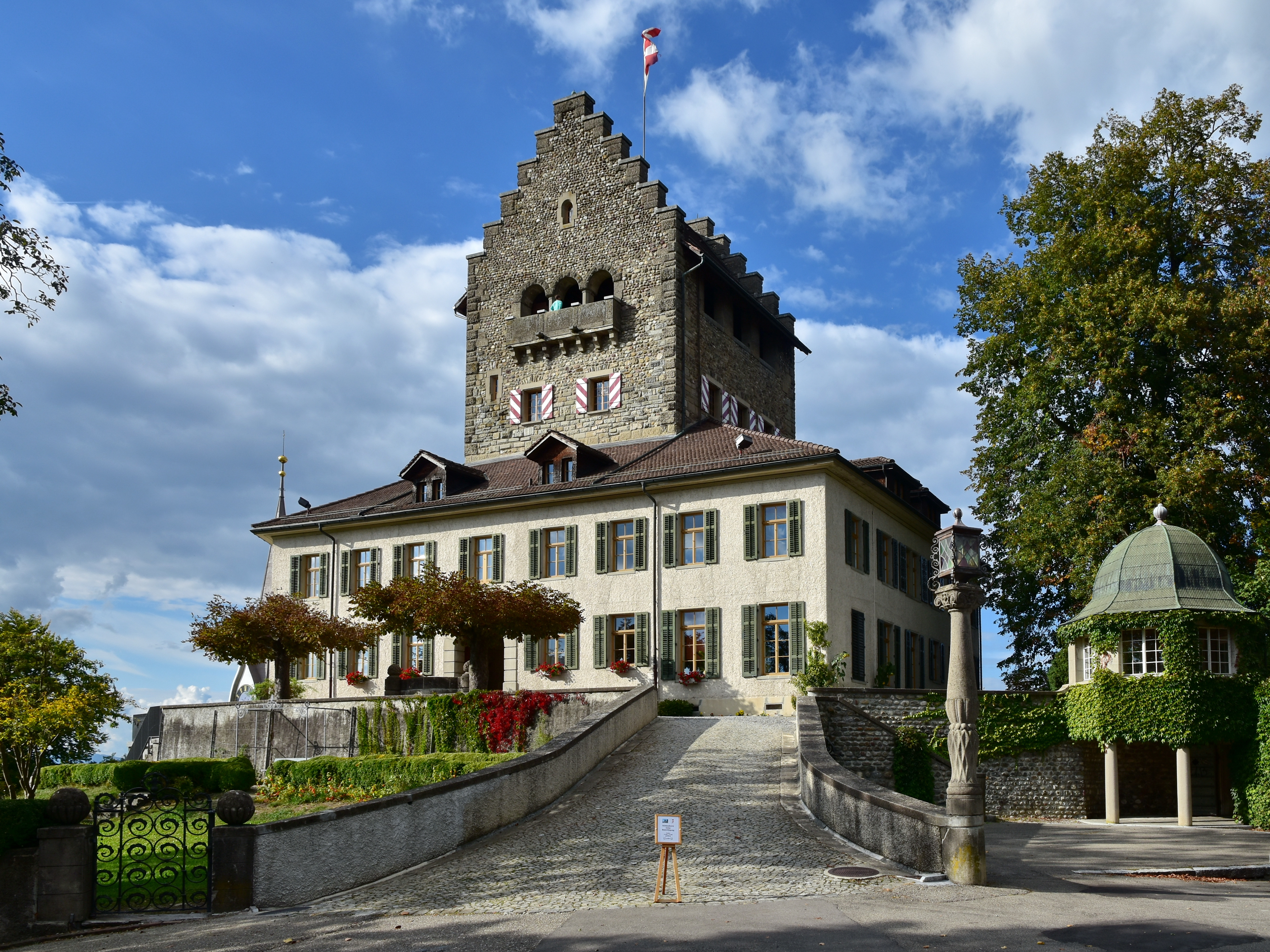 Schloss (Castle) in Uster (Switzerland)